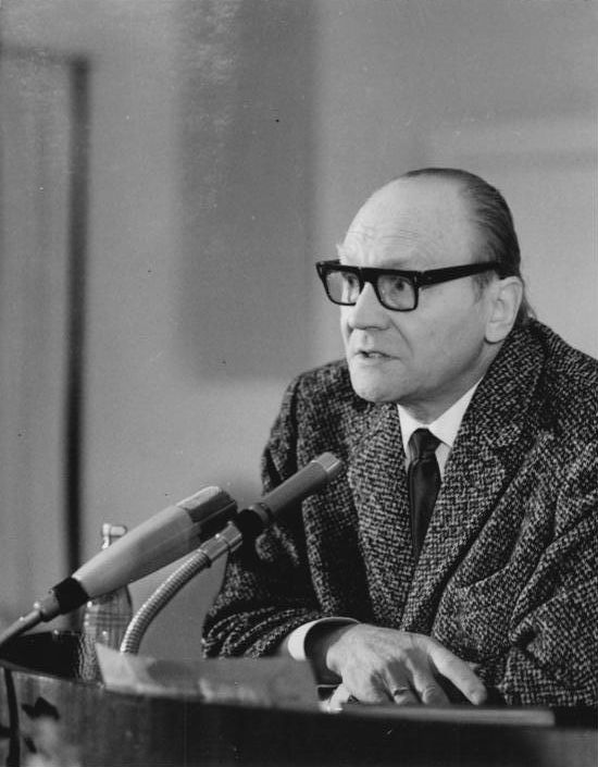 Zentralbild Franke 14.11.1966 Die 1. Jahreskonferenz des Deutschen Schriftstellerverbandes fand in der Zeit vom 2.11. - 4.11.66 in der Kongreßhalle am Berliner Alexanderplatz statt. 350 Teilnehmer der Konferenz (Schriftsteller, junge Autoren, schreibende Arbeiter, Literaturwissenschaftler und Bibliothekare) berieten über die Entwicklung der sozialistischen deutschen Nationalliteratur. UBz: Jurij Brezan während seines Diskussionsbeitrages.